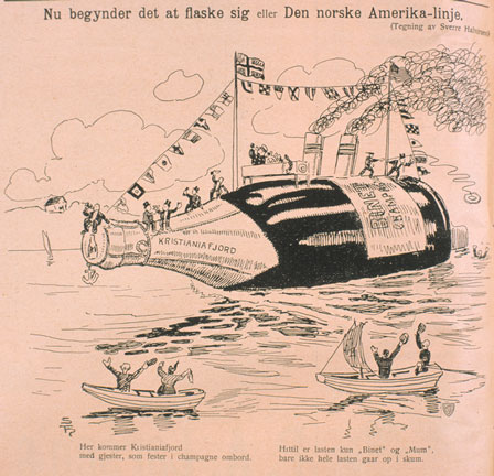 "Nu begynder det at flaske sig eller Den Norske Amerika-linje". Tekst: Her kommer Kristianiafjord, med gjester, som fester i champagne ombord. Hittil er lasten kun "Binet" og "Mumm", bare ikke hele linjen gaar op i skum. Manglende tiltro til Amerikalinjen ga seg mange utslag. Tegning av Sverre Halvorsen. Fra "Humoristen", 1913